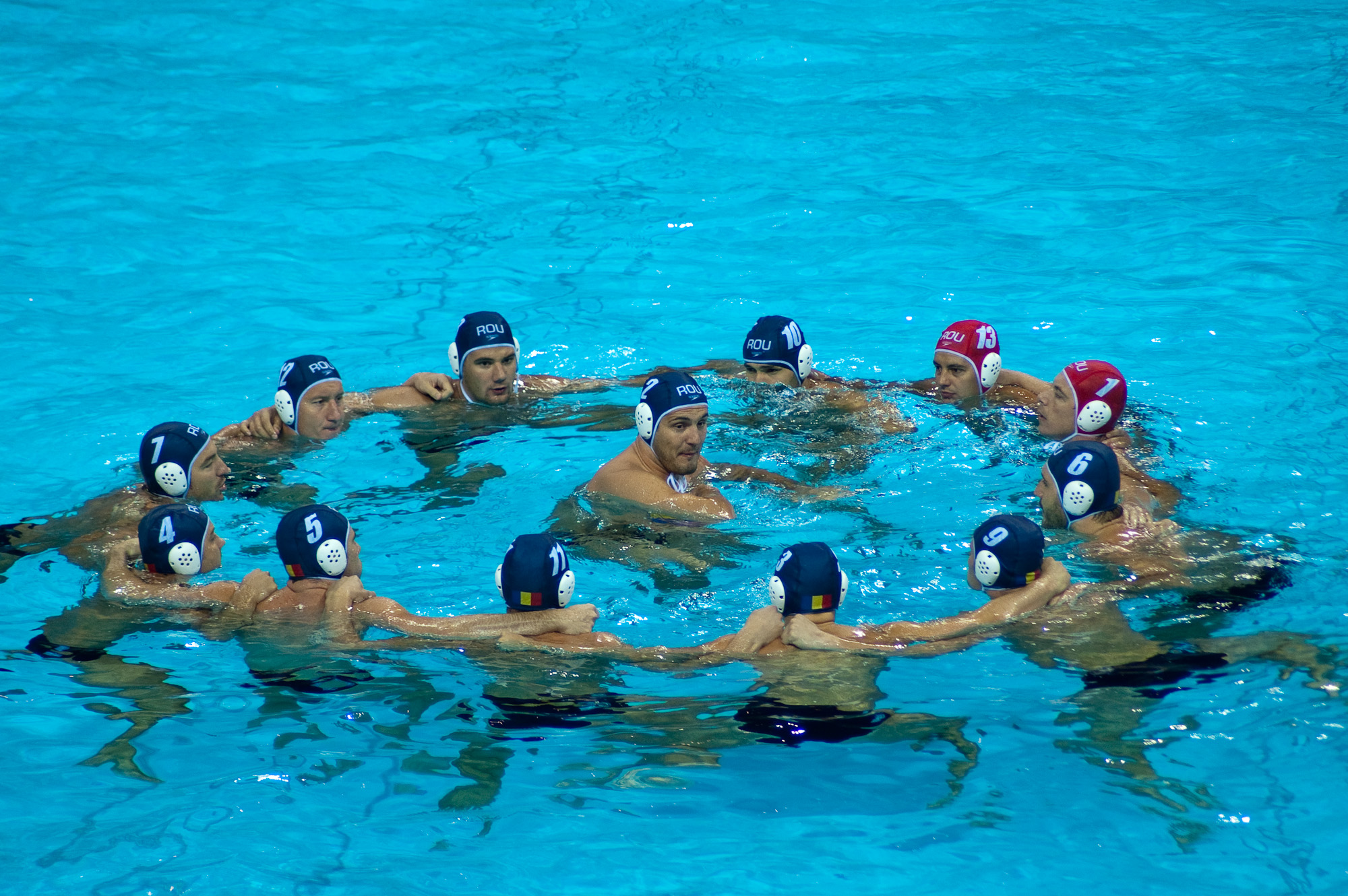 USA v Romania